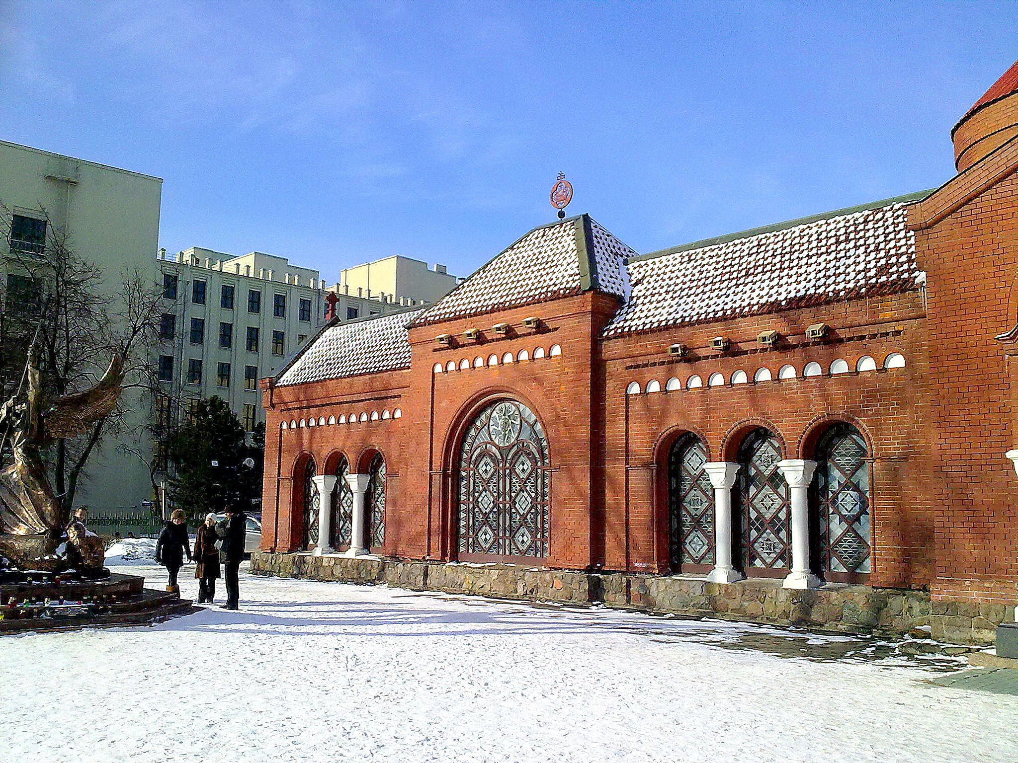 Беларуская (тарашкевіца): Комплекс касьцёлу Сьвятых Сымона і Алены (у межах агароджы): касьцёл сьв. Сымона і сьв. Алены, будынак плябані, вітражы касьцёлу сьв. Сымона і сьв. Алены, мэмарыяльная кампазыцыя «Звон Нагасакі». г. Менск This is a photo of Belarusian heritage monument. Reference number: 713Г000229 ( WLM)